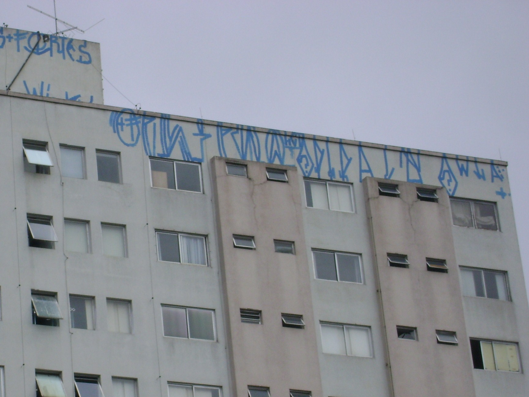 pixaçao